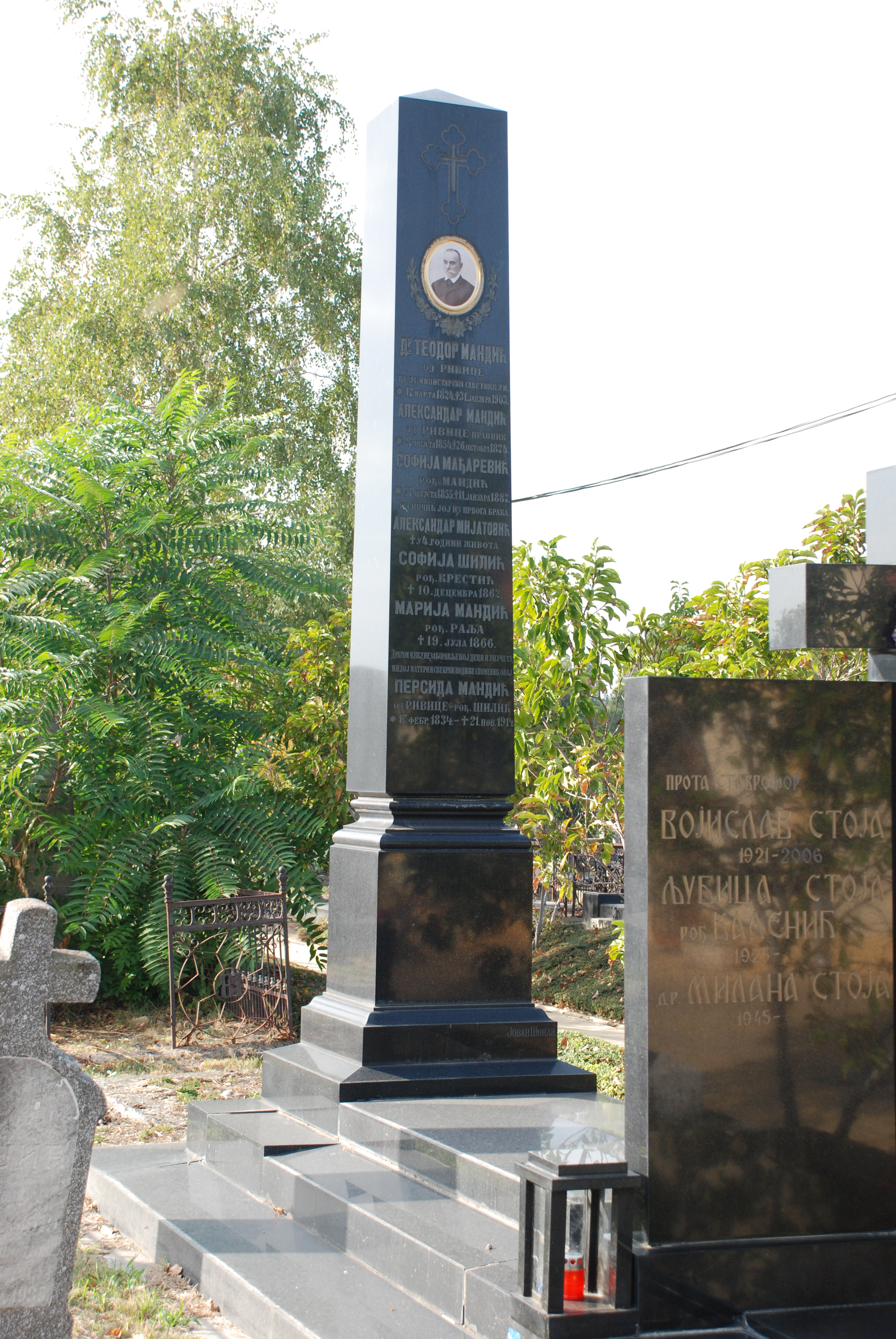 1824-1903, правник из Новог Сада, краљевски саветник, високи чиновник бечке владе, написао Успомене из Нашег црквено-народног живота